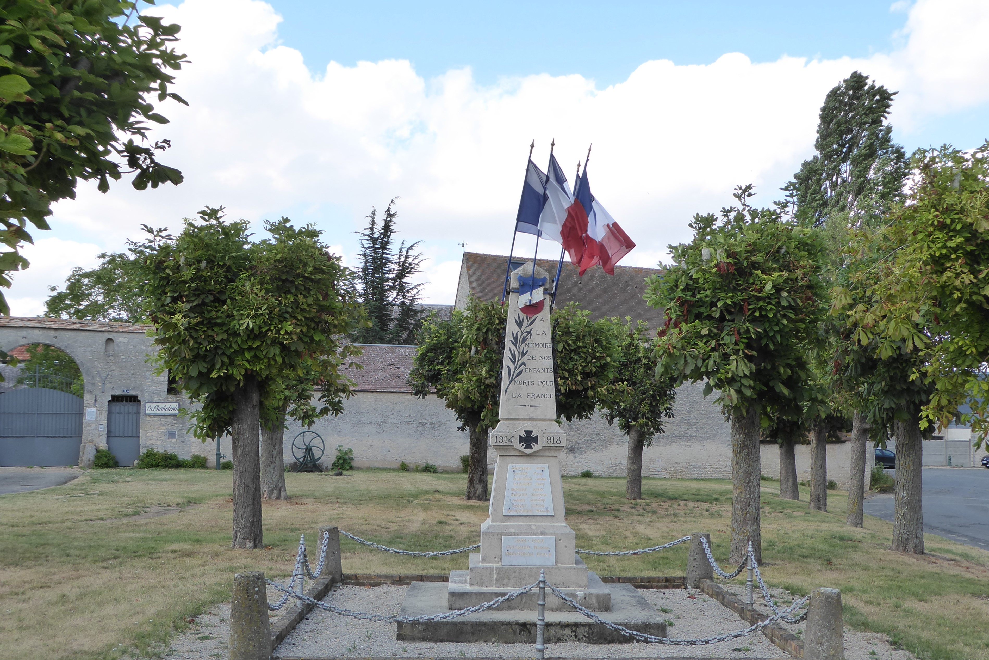 monument aux morts de Rouvray-Saint-Denis, Eure-et-Loir, France.